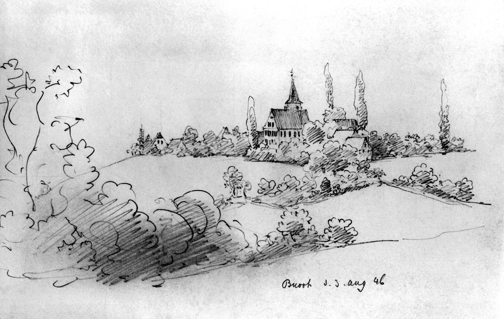 Buoch. Blick auf den Ort. (Schefold Nr. 922a, Bleistiftzeichnung 12 x 19 cm, Skizzenbuch 2, Bl. 13, Sammlung Hagmayer